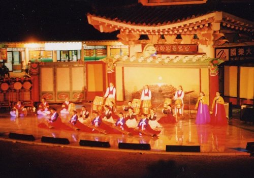 Geleneksel Kore Müziği.